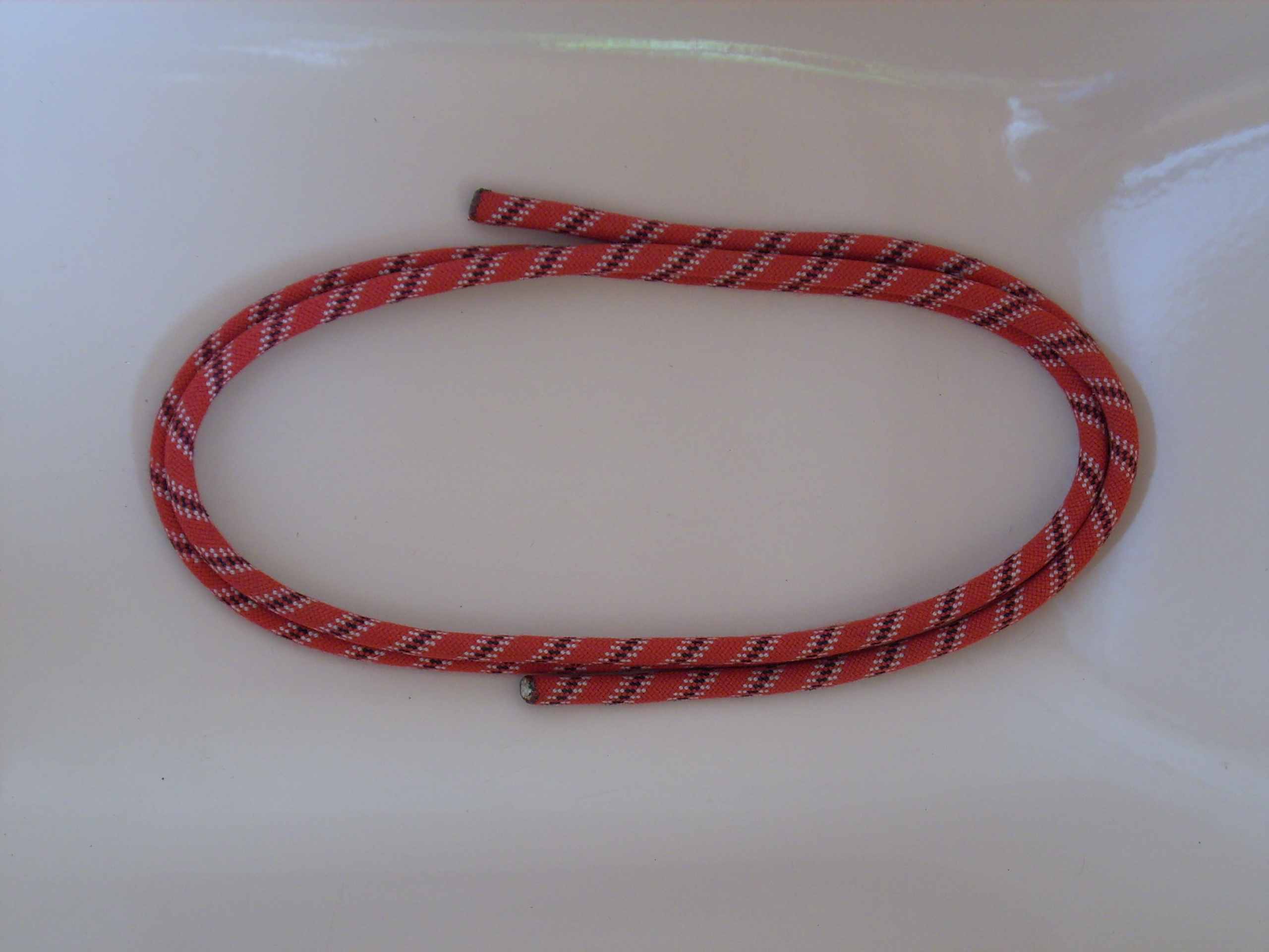 Leine aufschiessen in runden Buchten